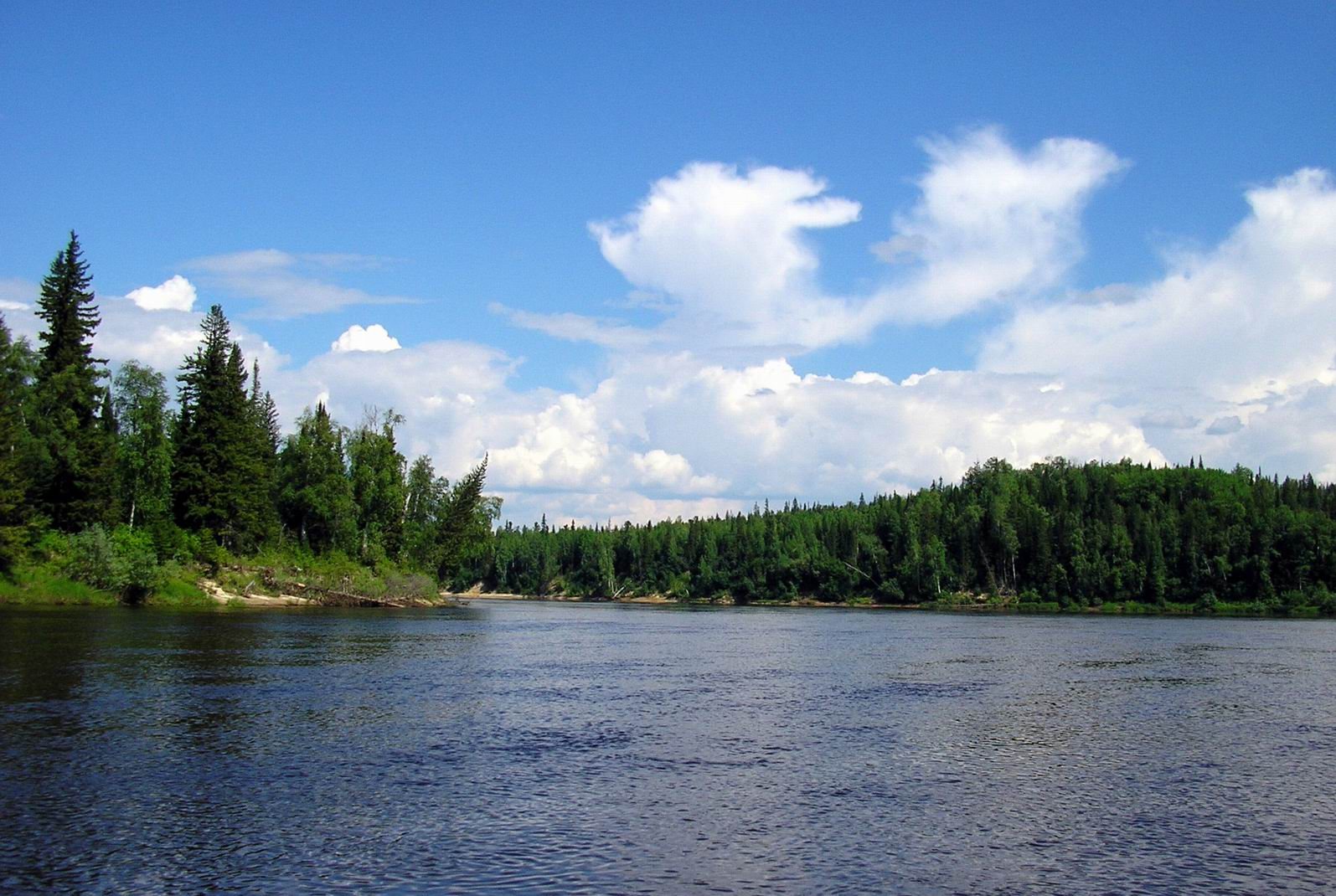 Річка Сим у пониззі (за 20 км від гирла)